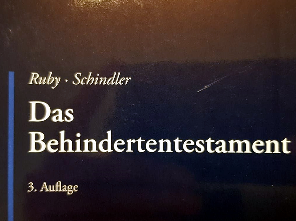 Ruby, Schindler, Das Behindertentestament, 3. Aufl., 2018